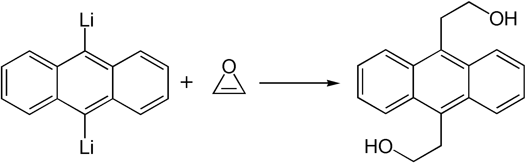 Nukleophile Ringöffnung von Oxiren